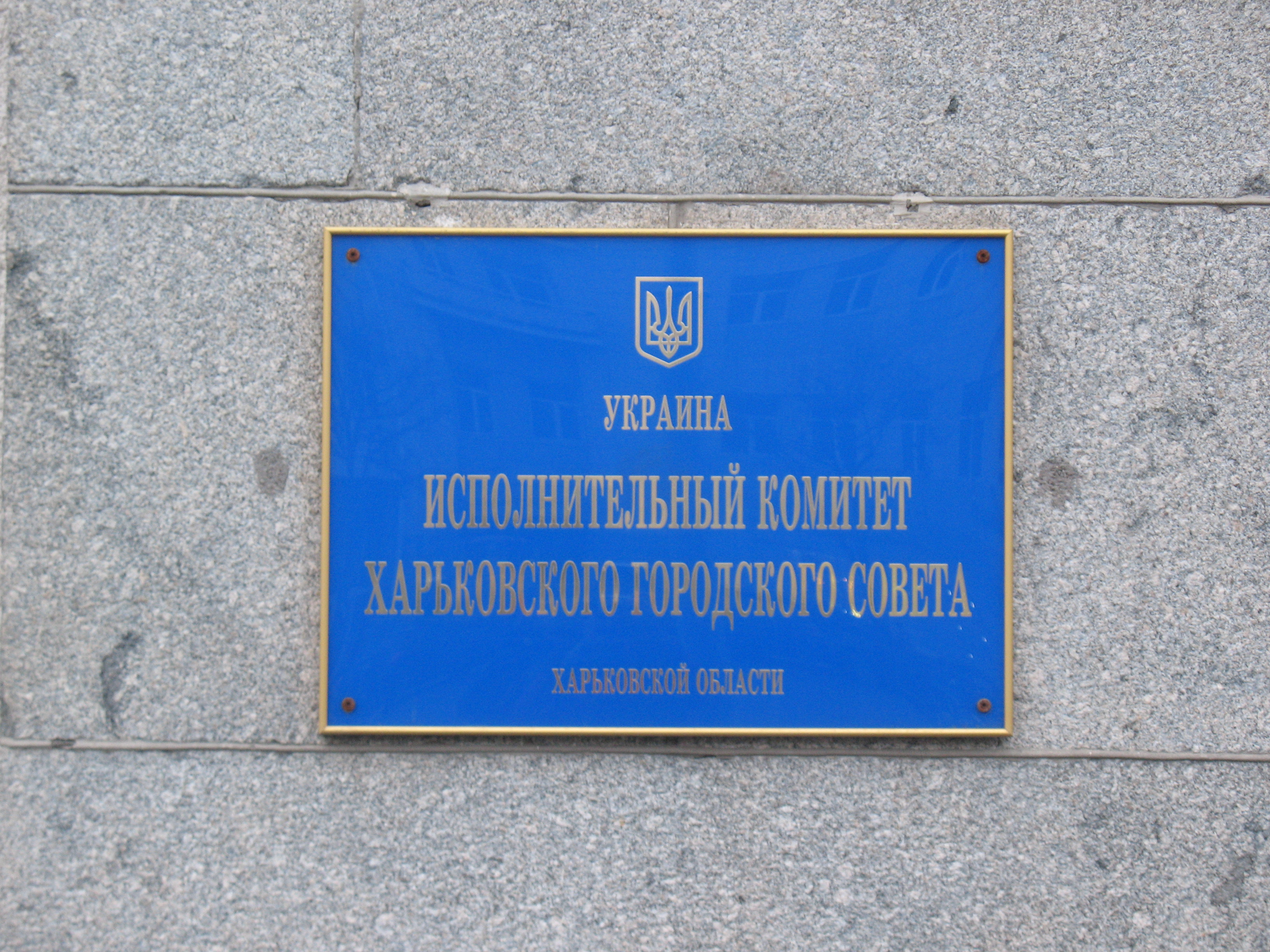 Вывеска Исполкома Харьковского городского совета (Конституции пл. 7) на русском языке.